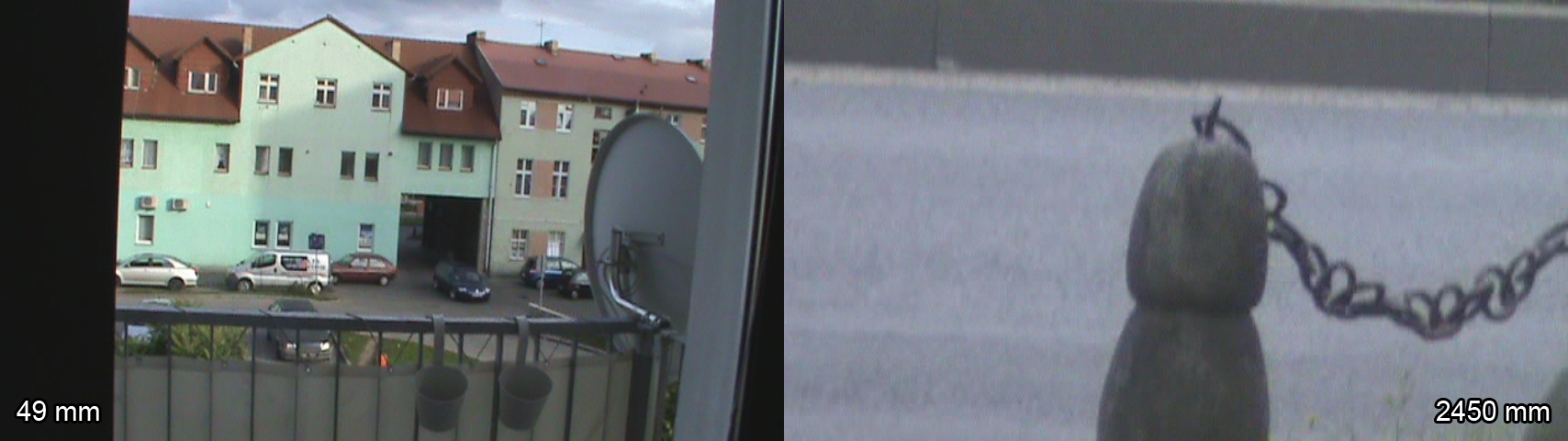 Porównanie obrazów, które można uwiecznić obiektywem zmiennoogniskowym z tego samego miejsca. W tym wypadku są to ogniskowe 45 mm i 2450 mm, co daje 50-krotny zoom optyczny.